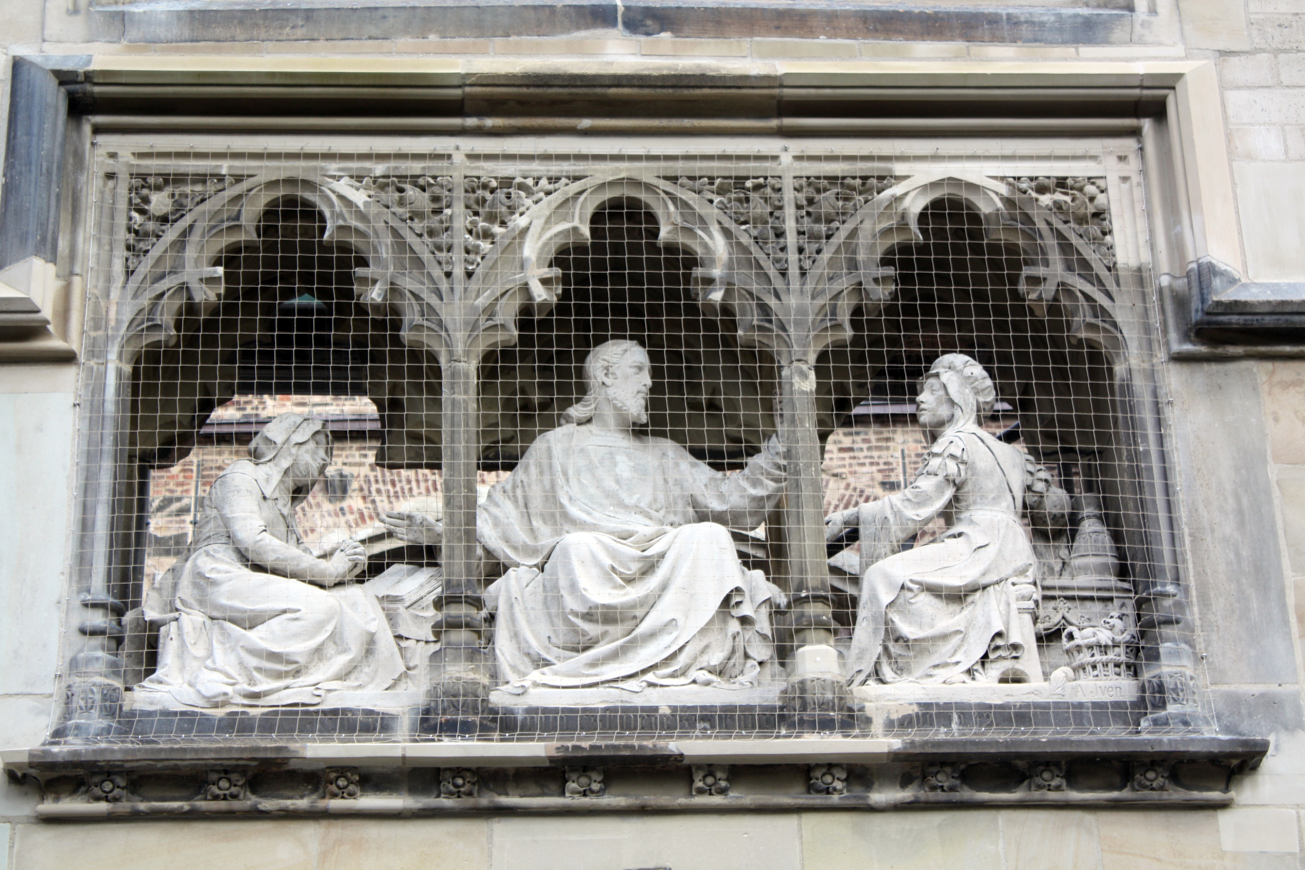 Alt St. Alban Köln, Detail an der Straßenfront